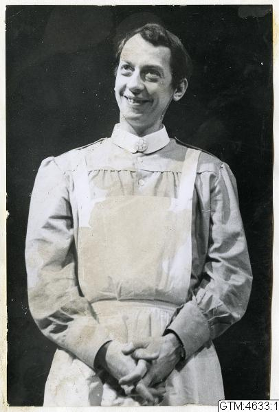 Måns Westfelt (1928-2015) som syster Gunnel i uruppsättningen av Hemmet på Göteborgs Stadsteater 1967.